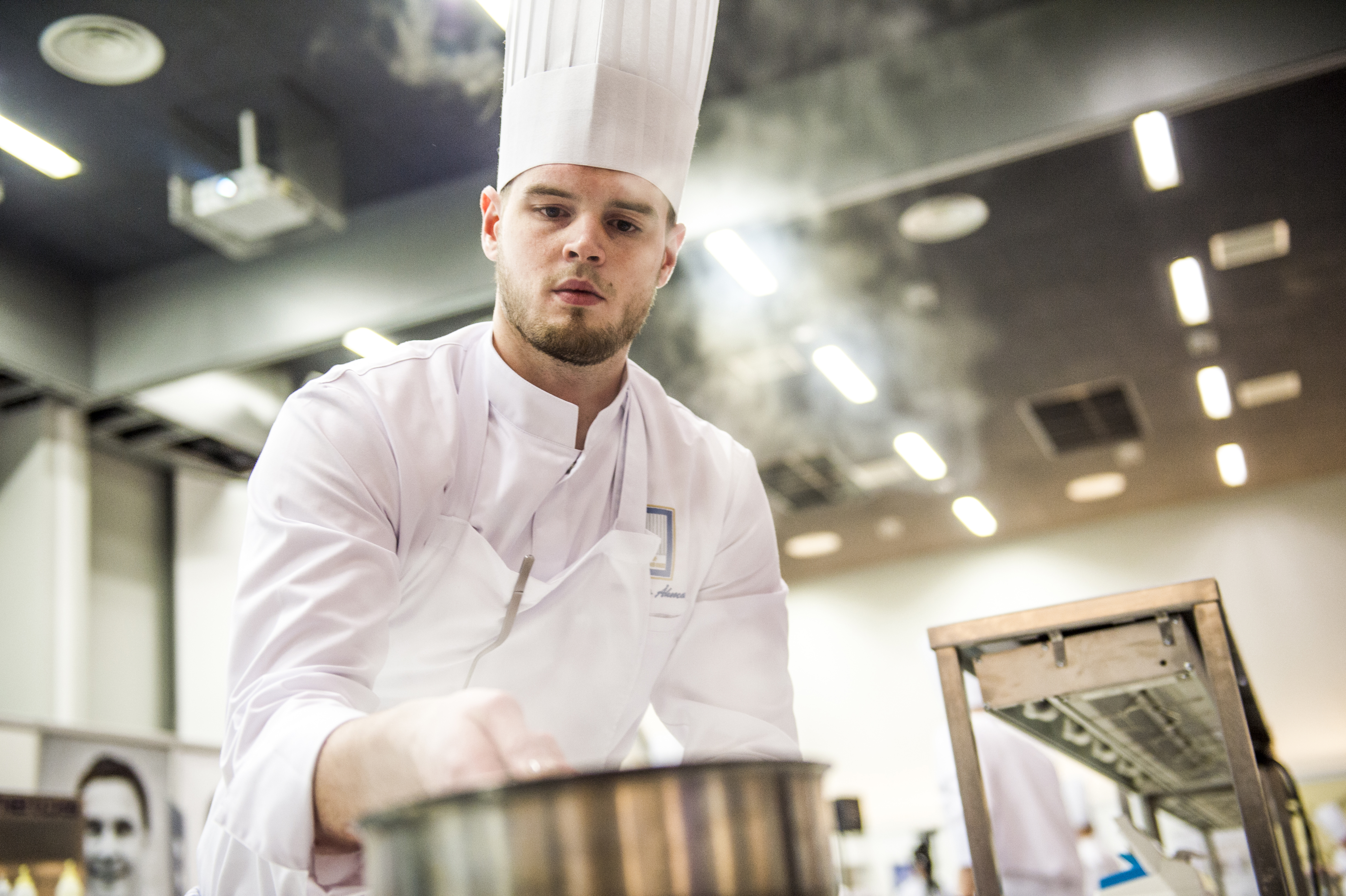 Vuoden Kokki 2017 -kilpailun finaalissa Mattias Åhman vei voiton